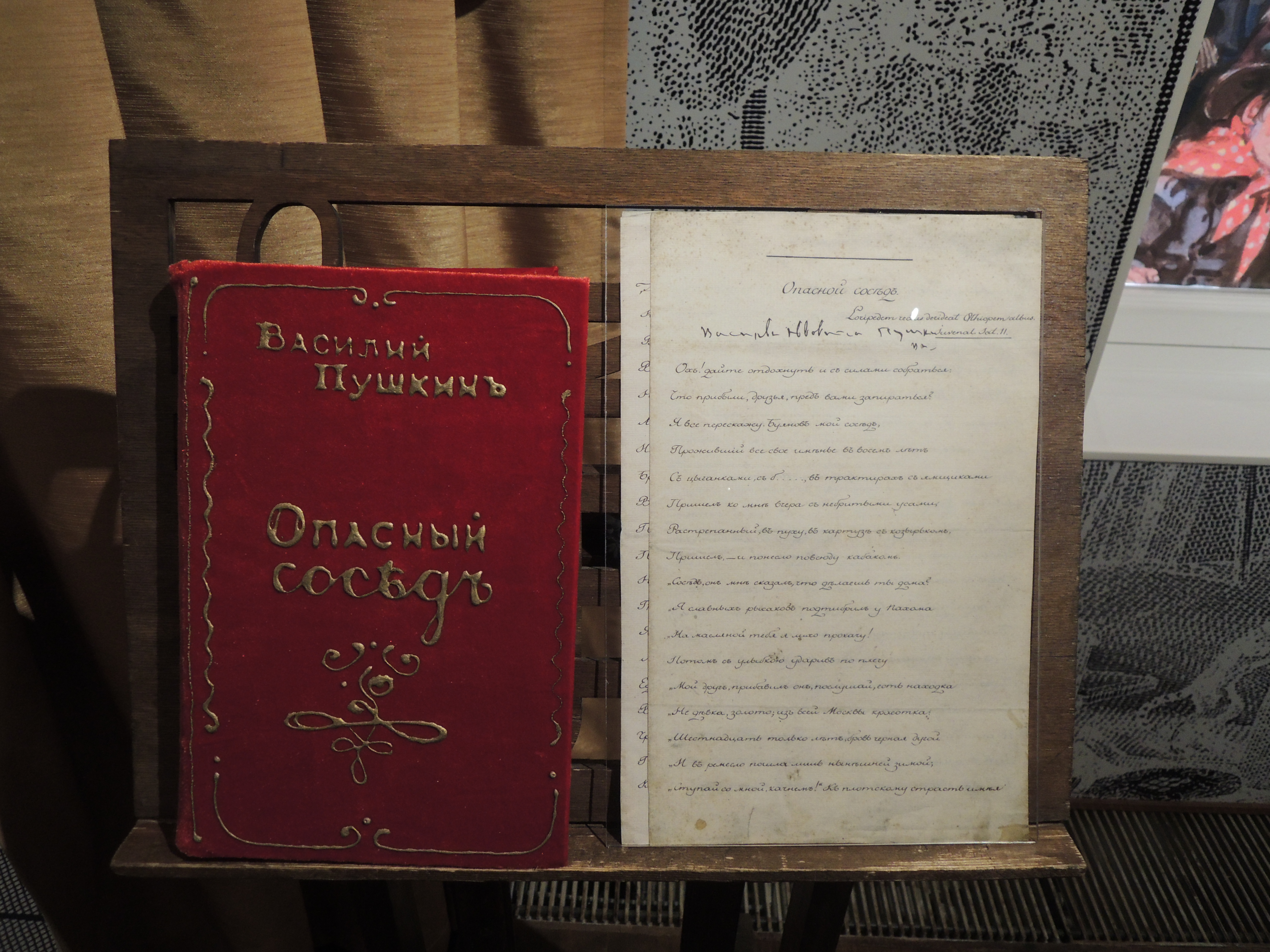 Дом-музей В. Л. Пушкина (филиал Государственного музея А. С. Пушкина) в день открытия 6 июня 2013 после масштабной реконструкции